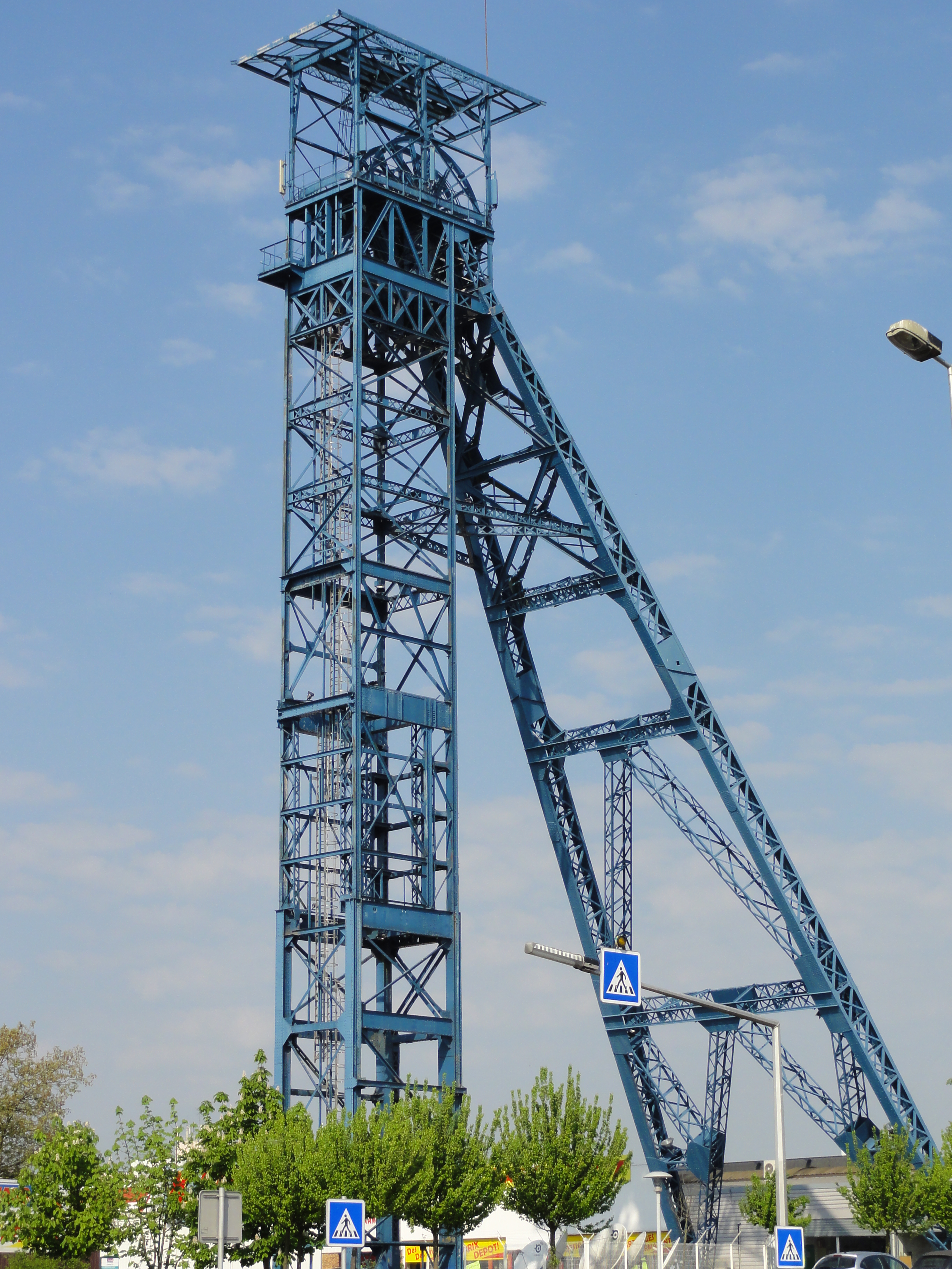 La fosse n° 1 - 1 bis - 1 ter de la Compagnie des mines de Liévin était un charbonnage du bassin minier du Nord-Pas-de-Calais constitué de trois puits situé à Liévin, Pas-de-Calais, Nord-Pas-de-Calais, France. .